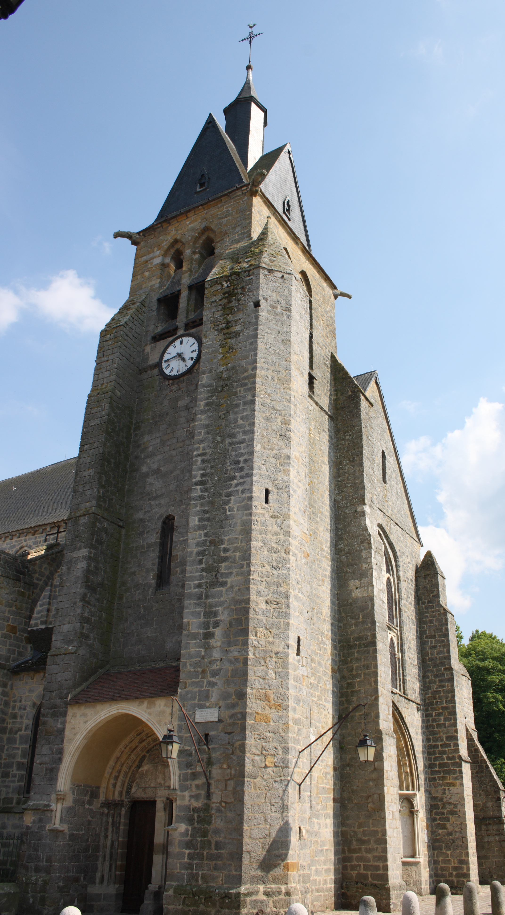 katholische Pfarrkirche Saint-Martin in Nangis